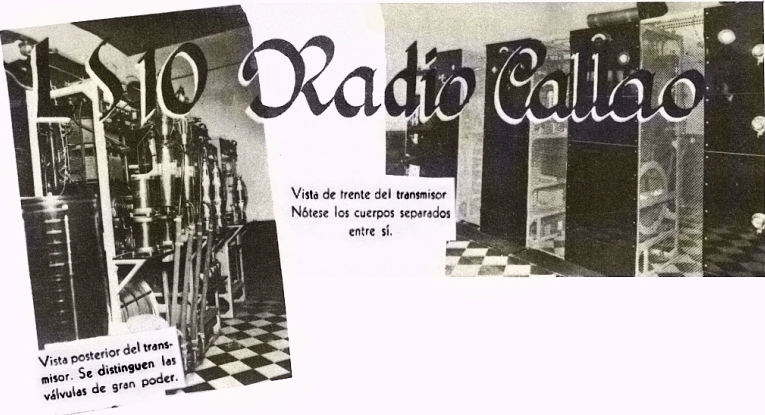 Antigua sede de la actual Radio del Plata